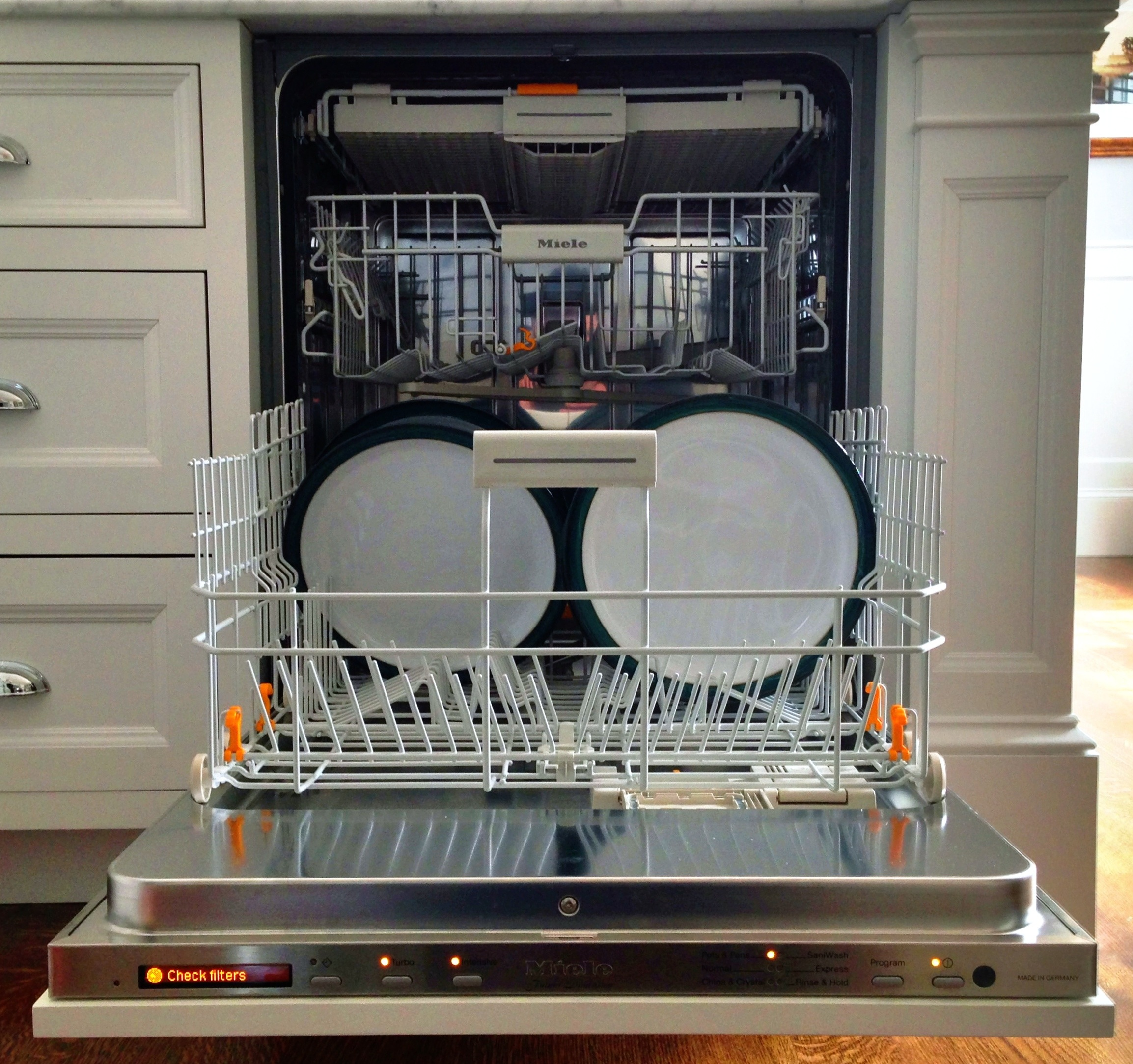 Miele Sep 3013